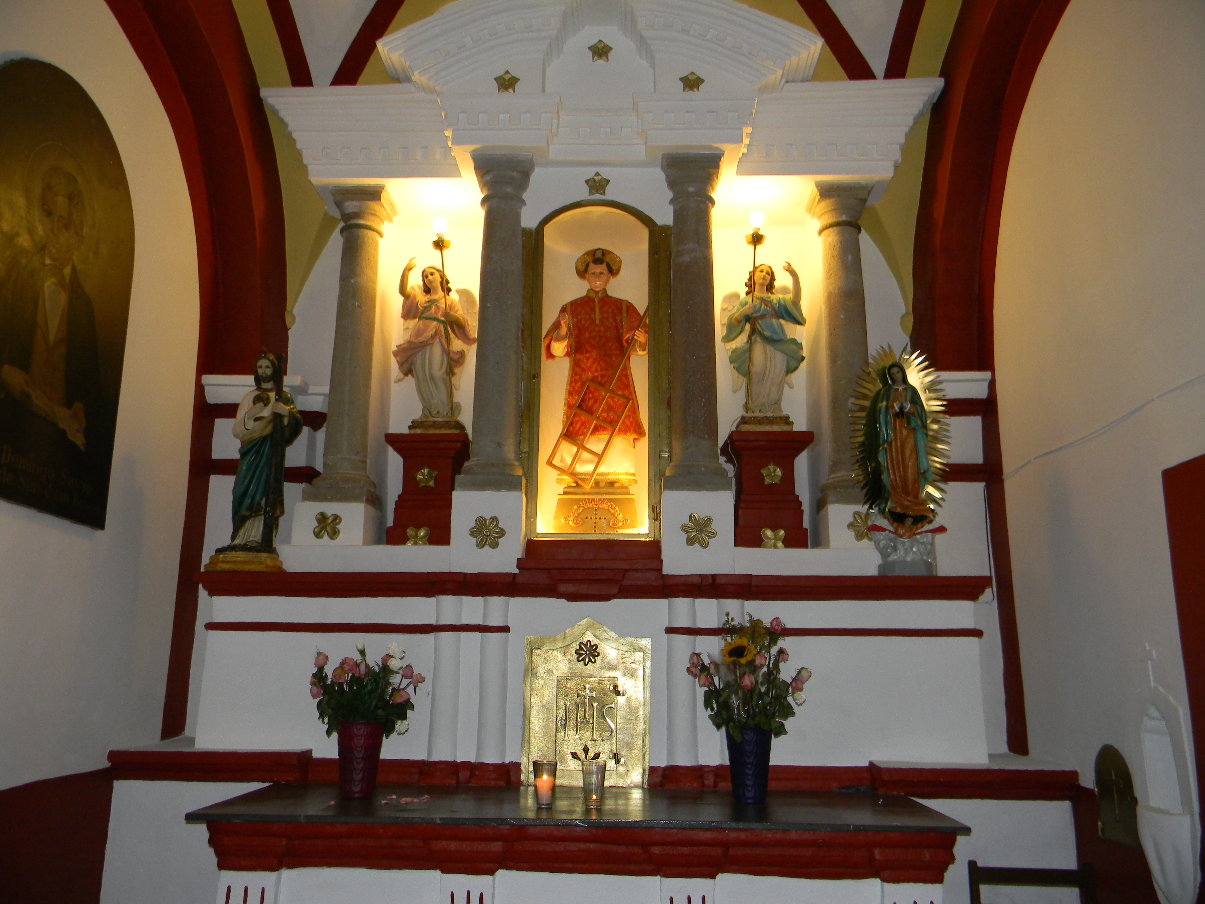 Altar principal de la antigua Capilla de San Lorenzo, donde se puede observar los bultos de San Lorenzo (centro), San Judas Tadeo (izquierda), la Virgen de Guadalupe (derecha) y dos ángeles; también se aprecia el Sagrario (centro) donde se guardan las hostias consagradas. Ubicado en el Barrio de San Lorenzo Huipulco, Tlalpan, Ciudad de México.